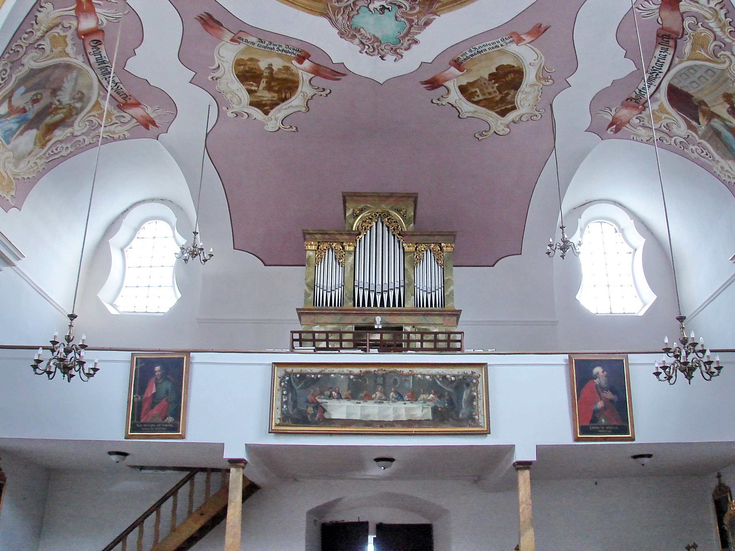 Katholische Pfarrkirche Mariä Lichtmeß